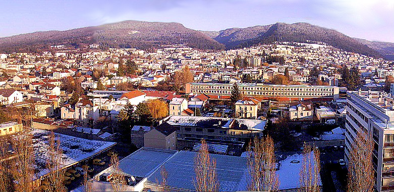 Vue générale Oyonnax